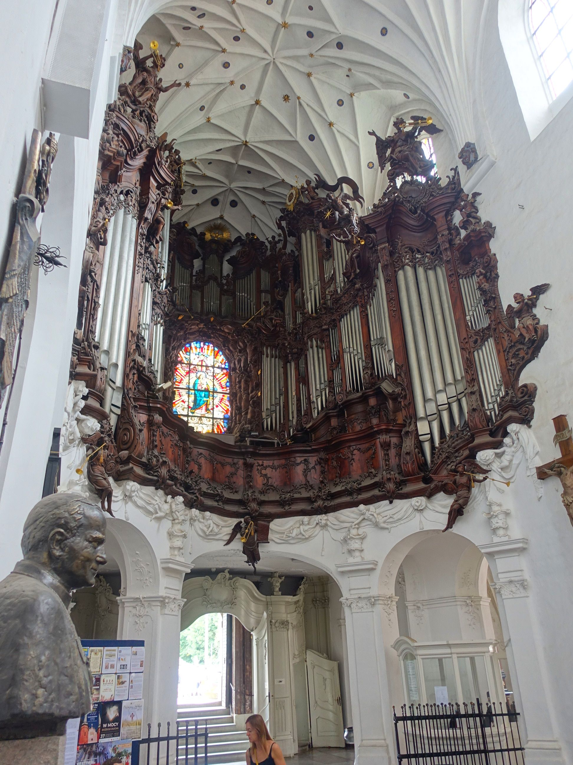 Orgel und Barockprospekt der Olivaer Kathedrale